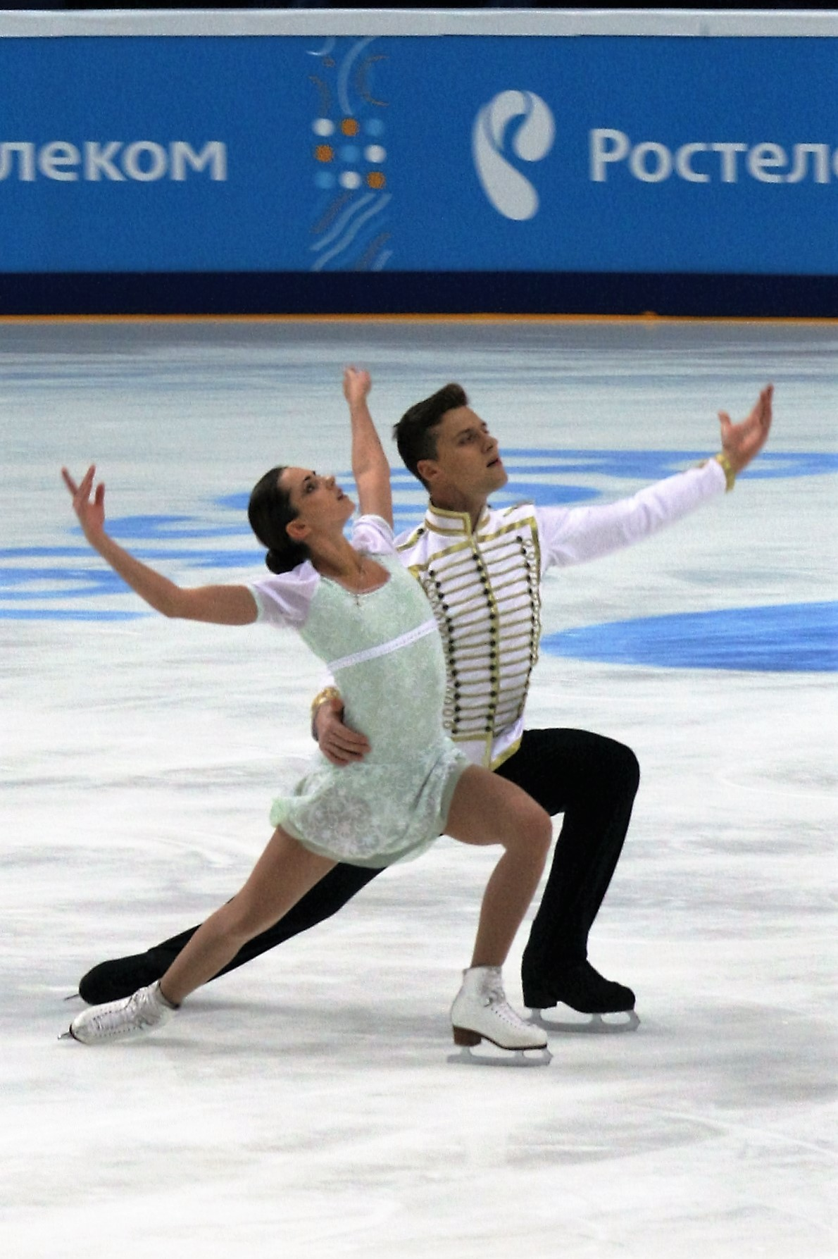 Наталья Забияко / Александр Энберт (Россия) на Кубке Ростелекома 2016.